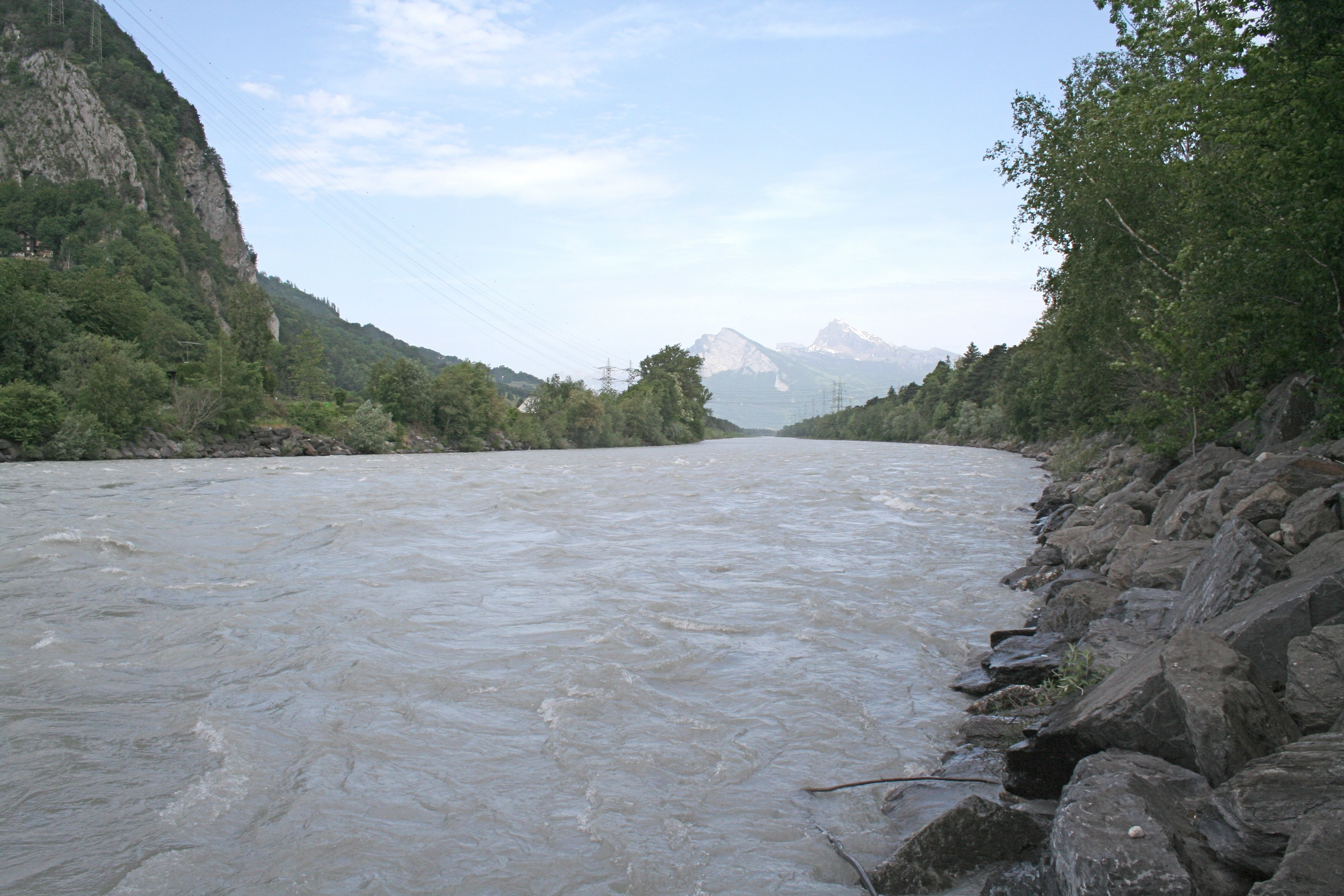 Alpenrhein bei Mastrils Richtung Norden, hinten Freileitungskreuzungen beim Unterwerk Sarelli